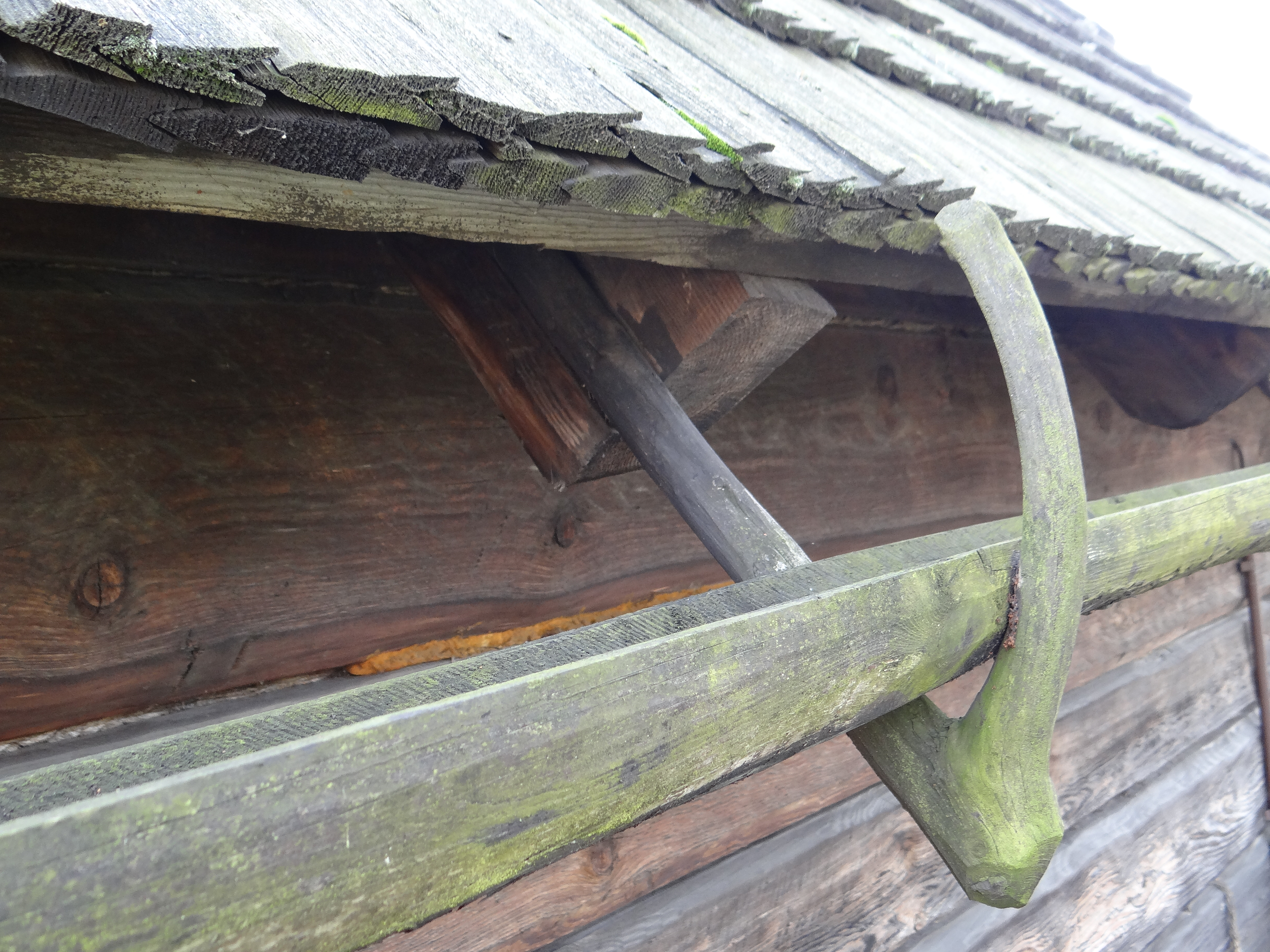 Przeworsk, dom Urbana, kon. XIX